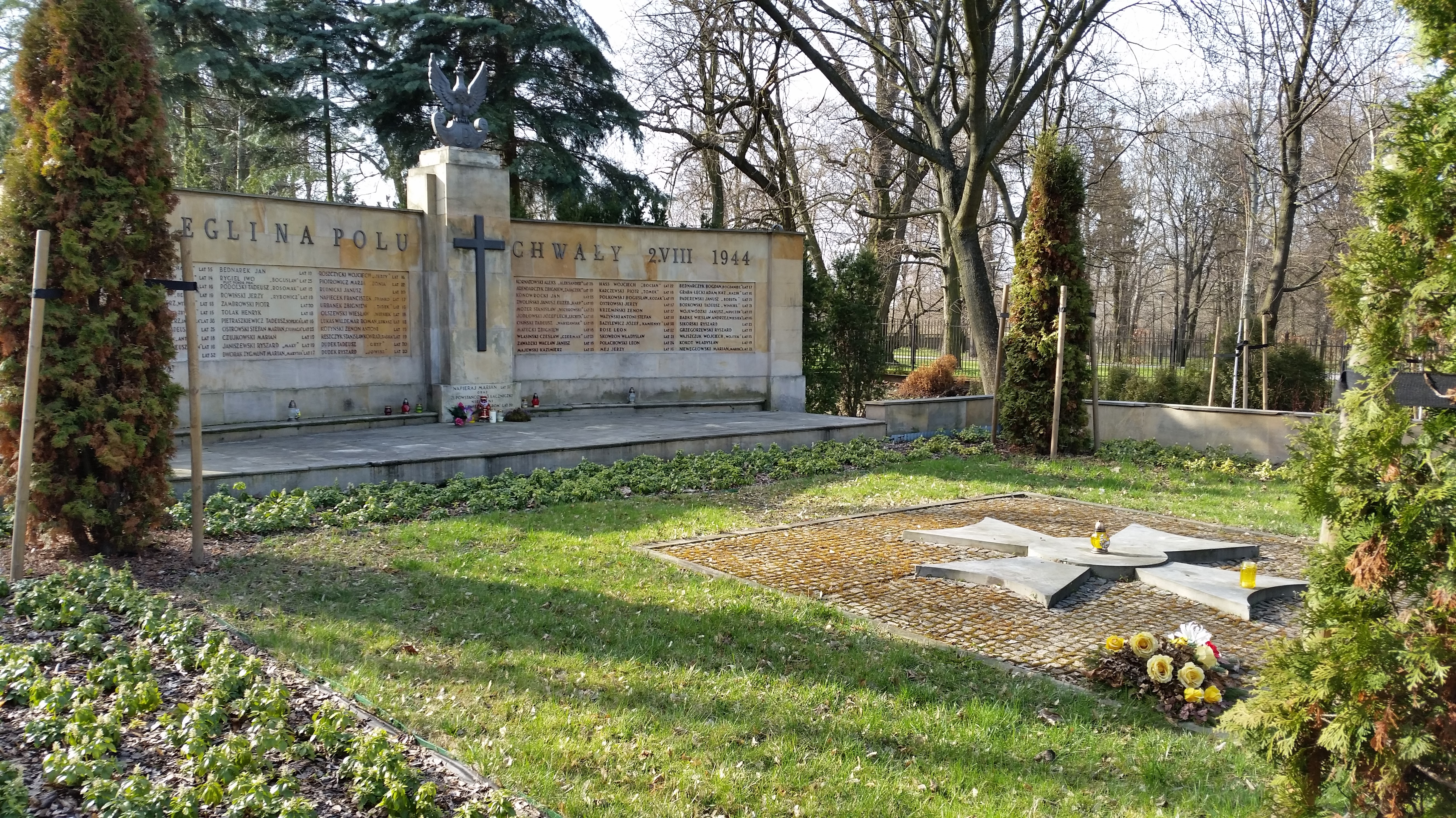 Pomnik Żołnierzy Armii Krajowej z IV Oddziału Ochota, walczących w Powstaniu Warszawskim, poległych 2 sierpnia 1944